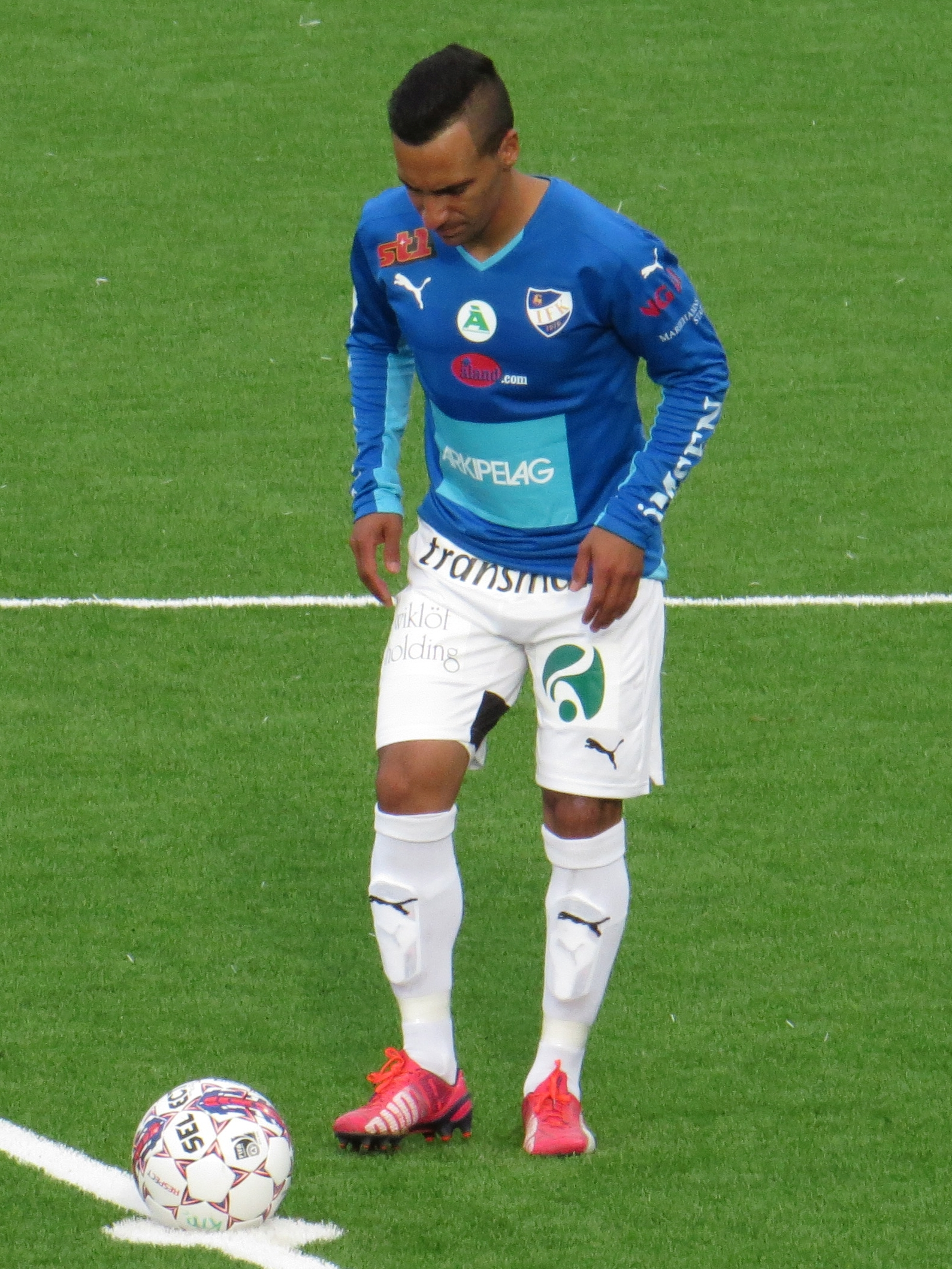 Diego Assis, brasilialainen jalkapalloilija IFK Mariehamnin joukkueessa kaudella 2015.